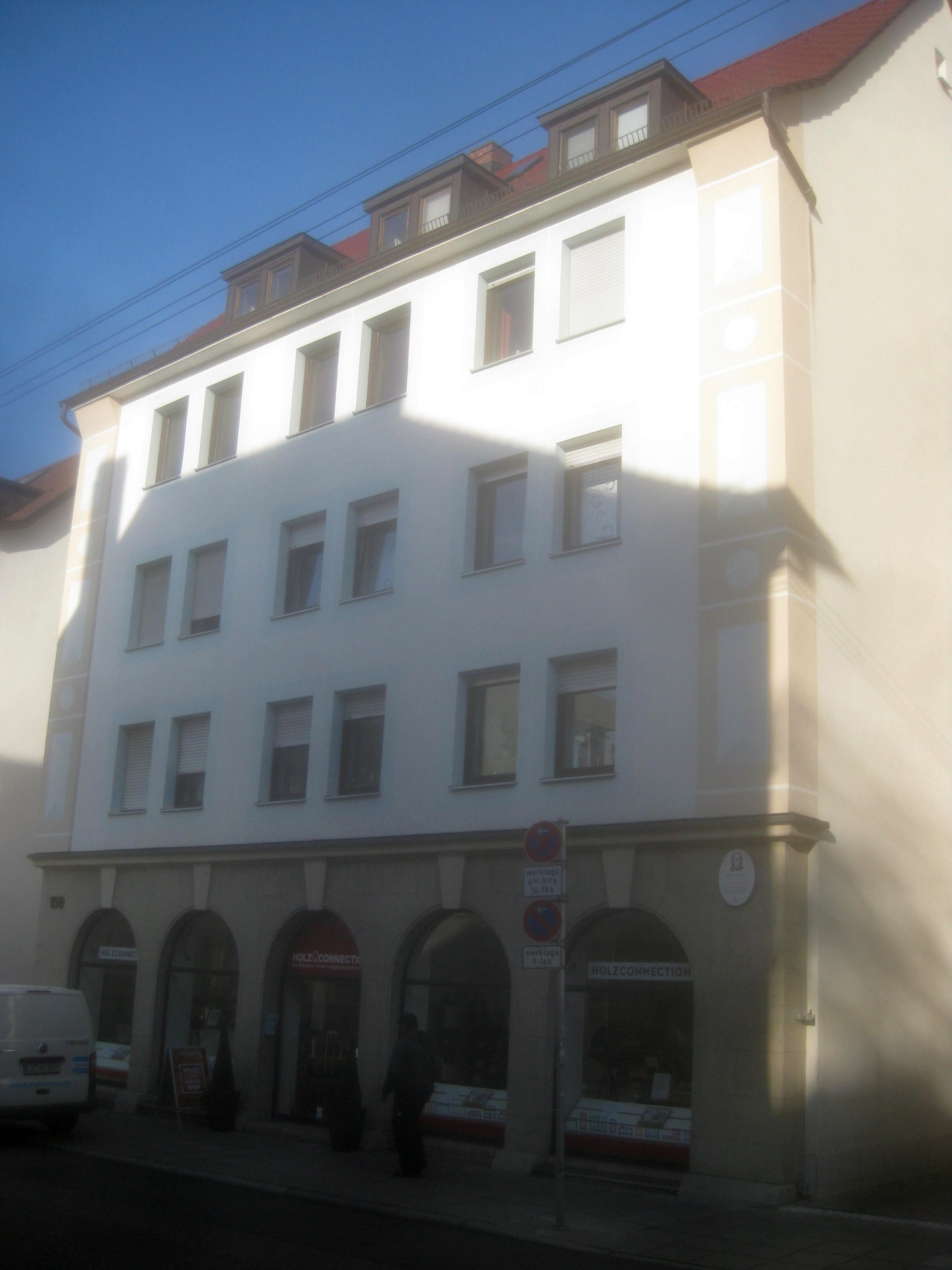 Geburtshaus von Bruno Frank mit Gedenktafel, Stuttgart, Silberburgstraße 159.